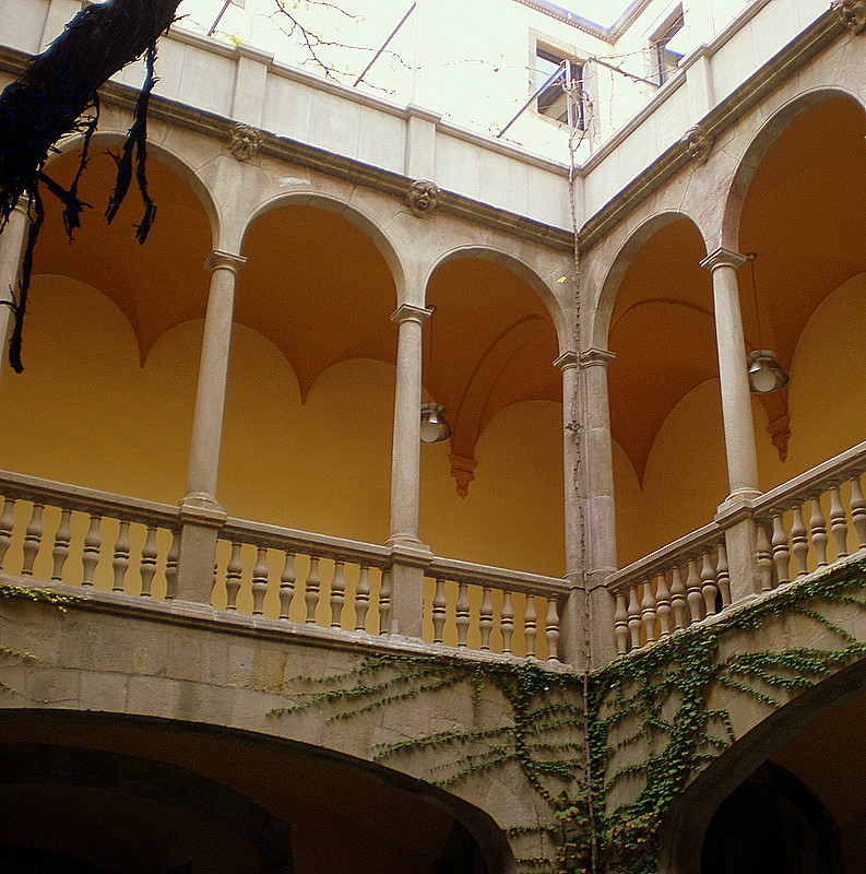 Barcelona - Pis superior del Palau del Lloctinent